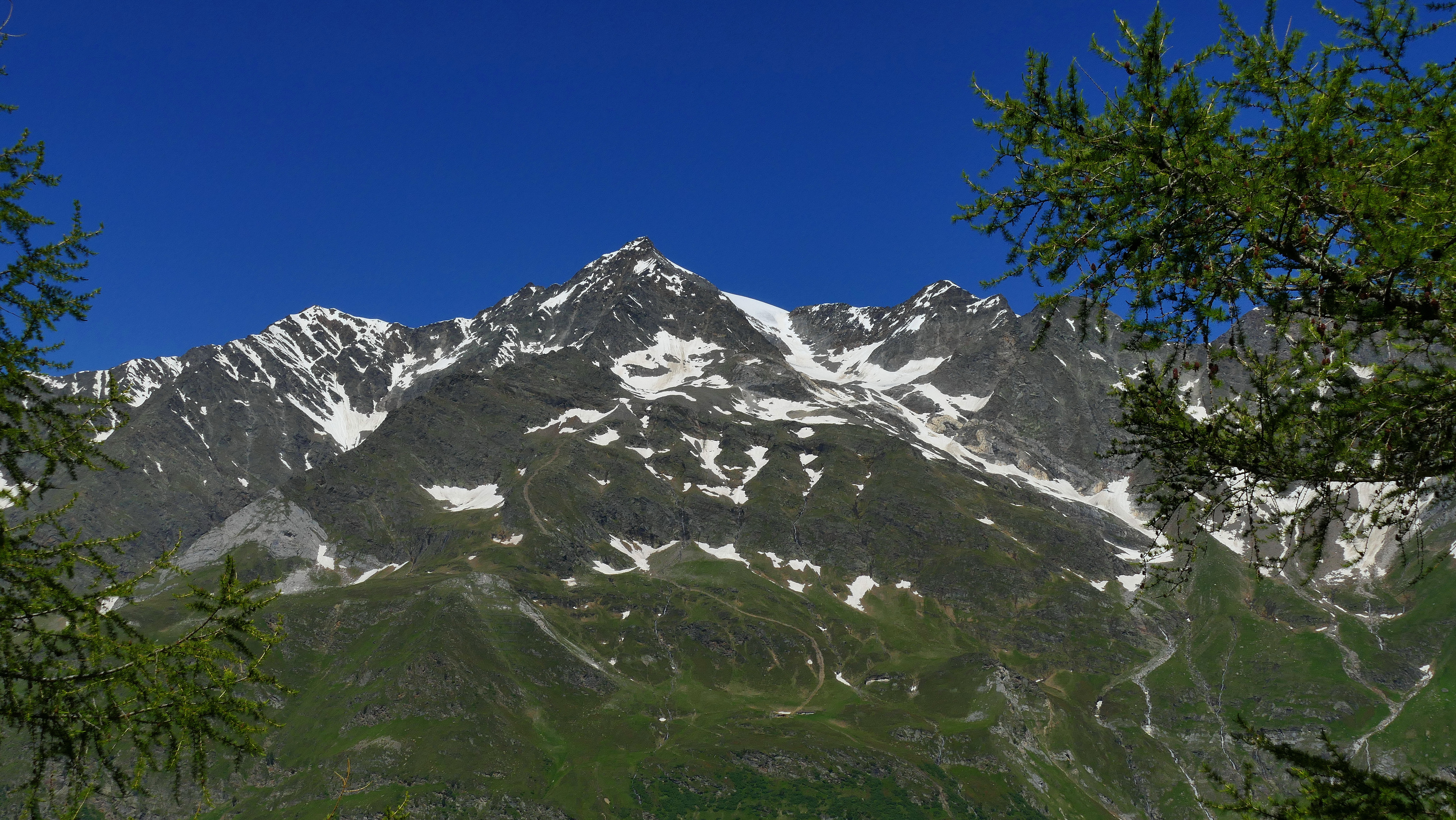 Parco naturale Gruppo di Tessa (Q1970690) Valle di Plan, Cima delle Anime